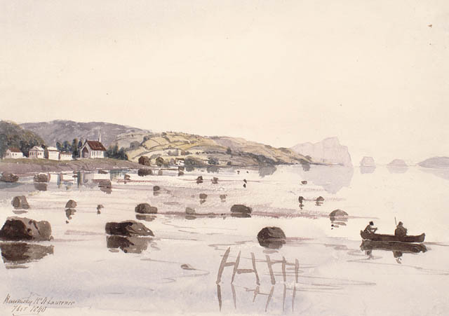 Vue de la rivière Rimouski, à son embouchure. En arrière plan, le village de Rimouski, Québec.